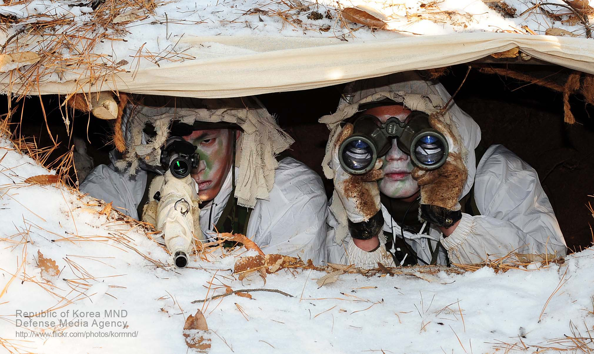 육군 60사단 장병들이 작전지역 일대에서 정찰감시작전 훈련을 펼치고 있다. 촬영 김태형 기자